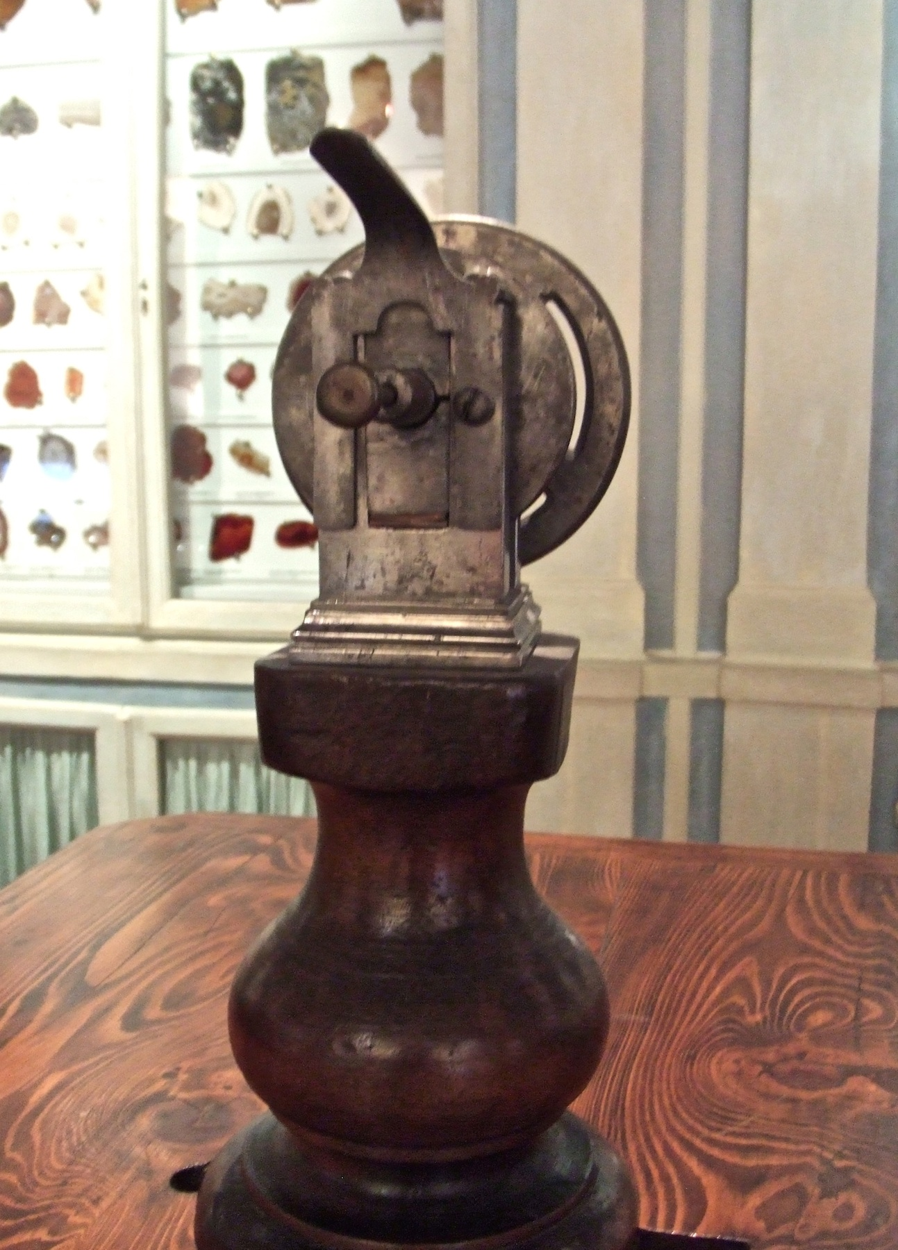 Touret de meulage au Musée de la Manufacture de pierres dures de Florence